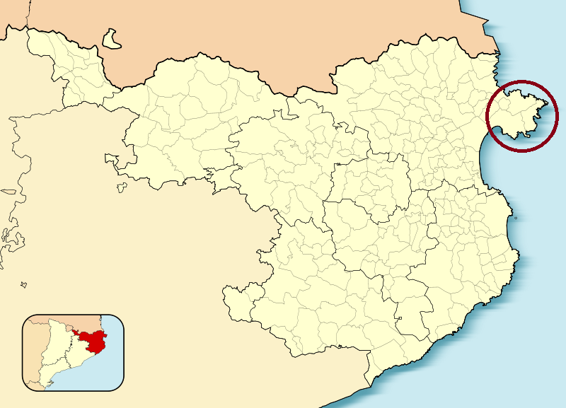 Localització Cap de Creus al mapa de la provincia de Girona